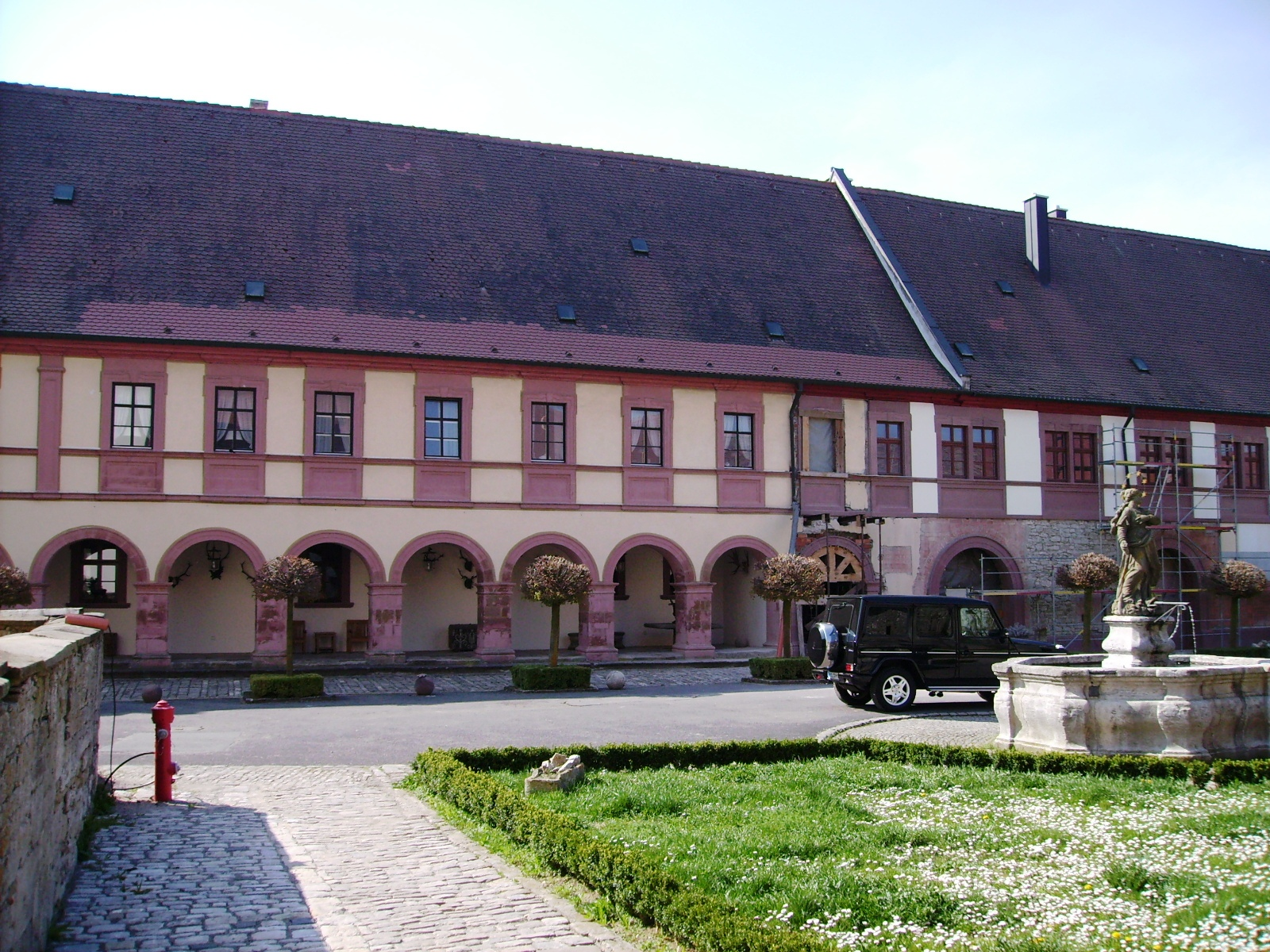 Das Kloster Tückelhausen ist ein ehemaliges Kloster der Kartäuser in Ochsenfurt in Bayern.